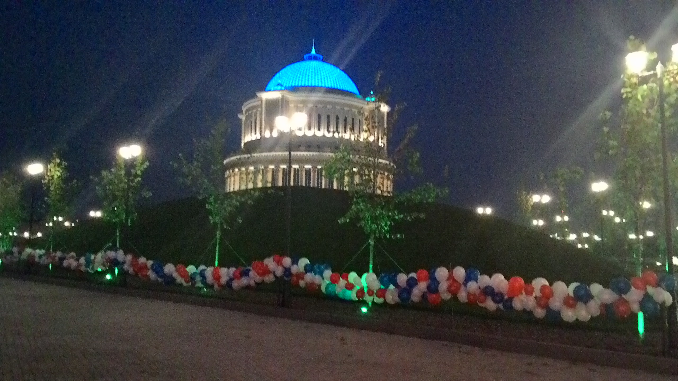 Грозненская опера